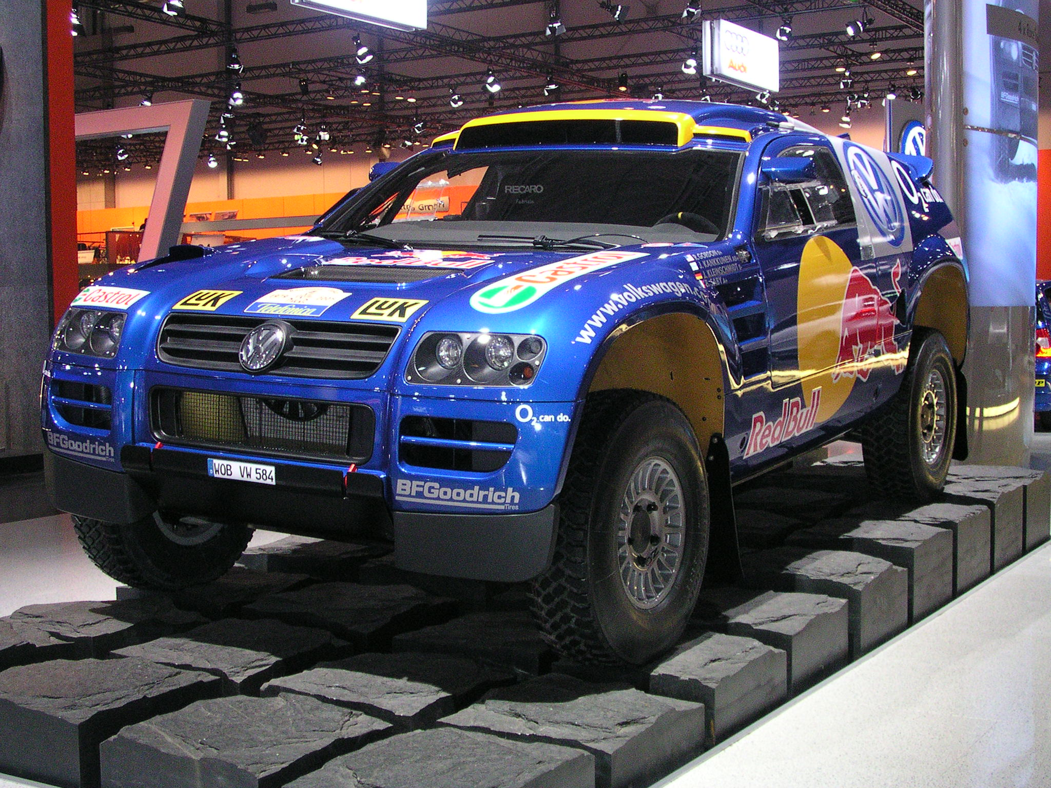 VW Race-Touareg-2 bei der Essener Motorshow 2004